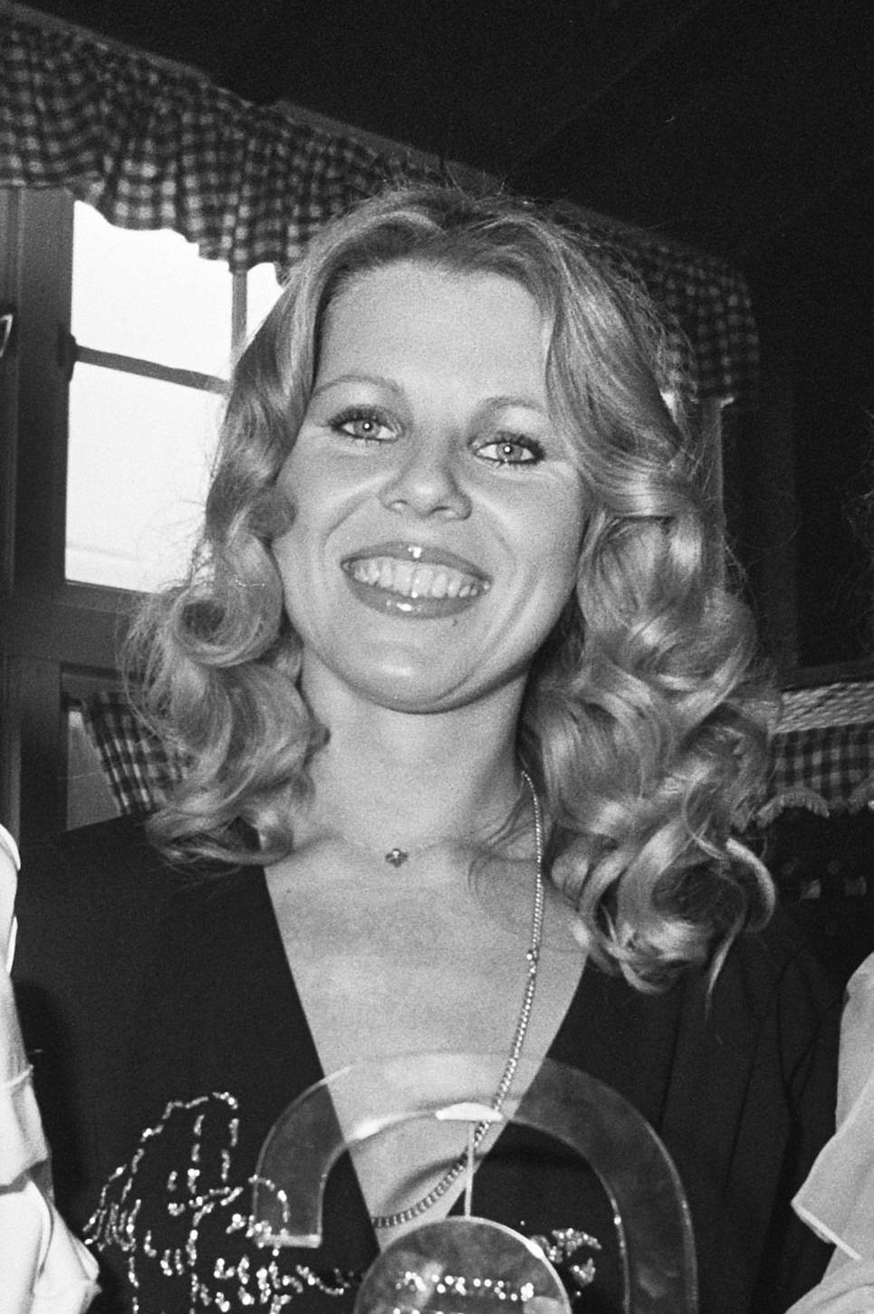 Luv' ontvangt de Conamus Exportprijs uit handen van violist Theo Olof